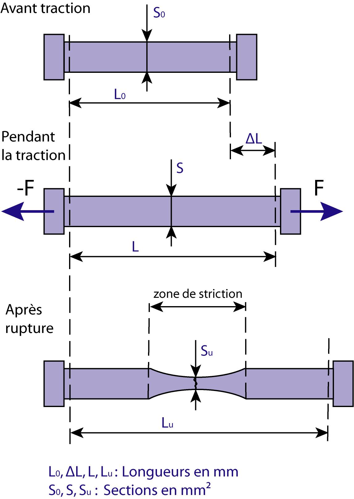 Schéma annoté d'une poutre sollocitée en traction faisant apparaître les notions d'allongement et de striction. Auteur: Xavier Lory